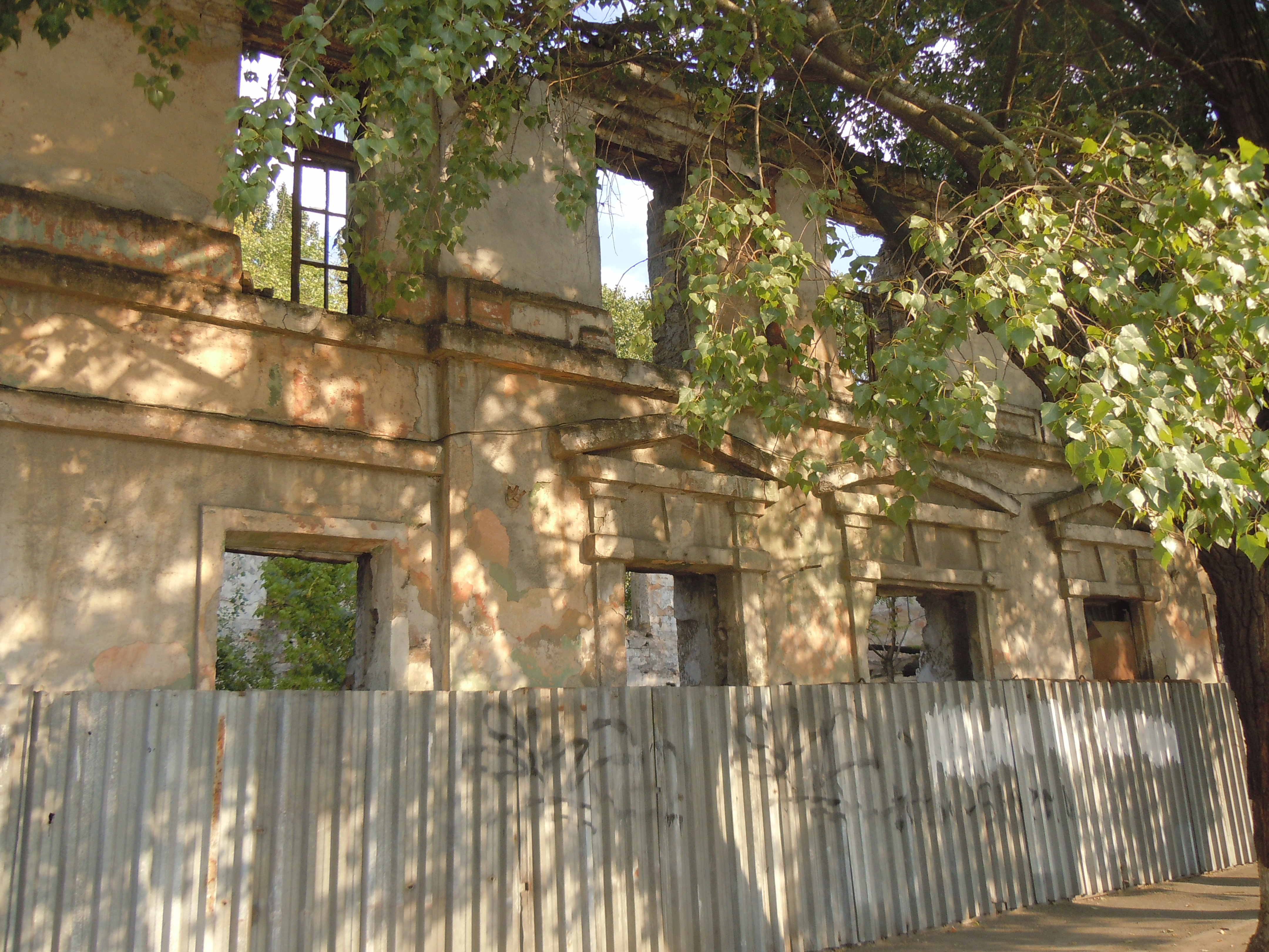 Будівля школи, в якій у 1940-1941 рр. навчався П.М. Вертелецький - Герой Радянського Союзу, Одеса, Отамана Головатого вул., 96, СШ № 66 (кутова будівля)